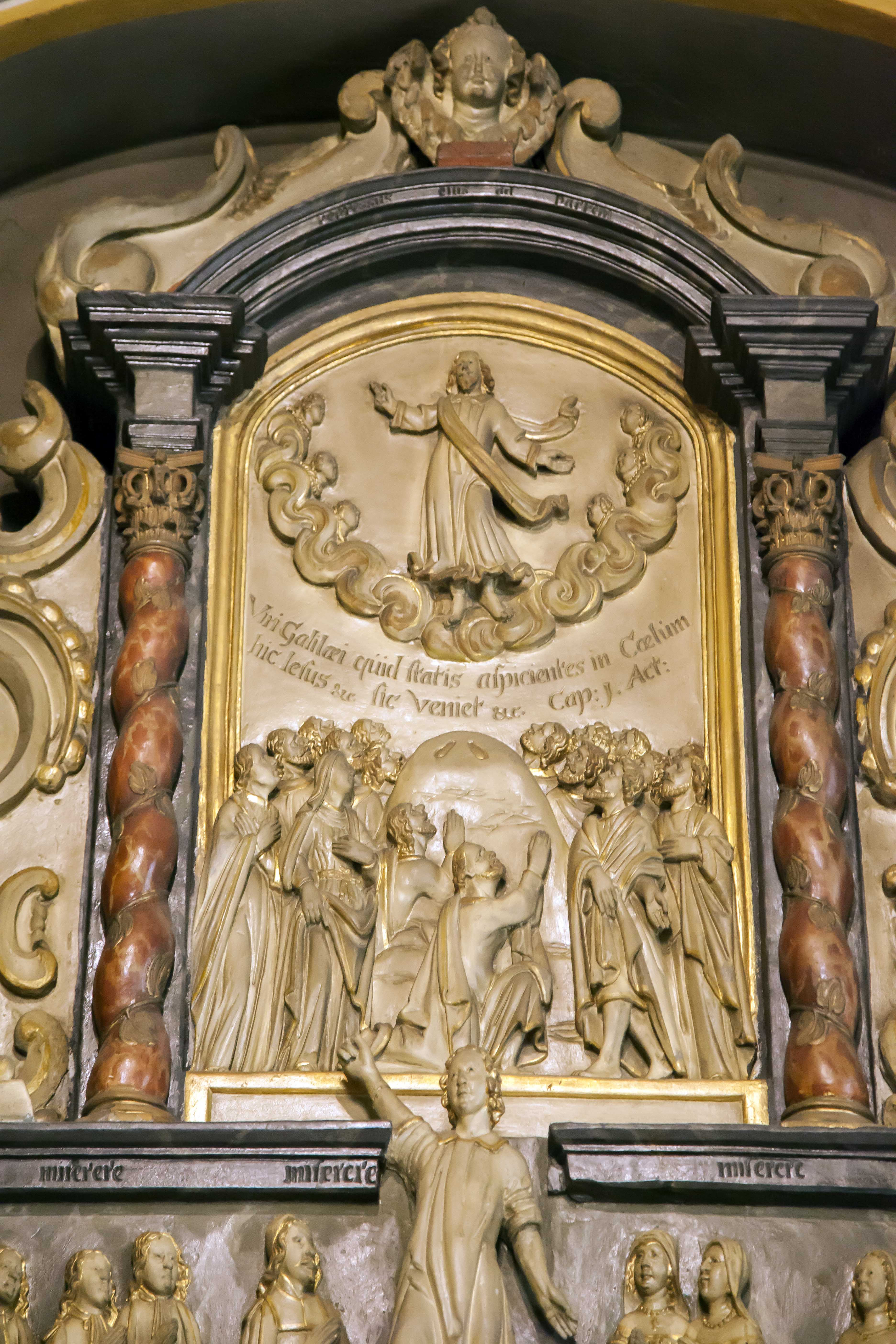 Bönkerskapelle Rheine - Altar - Himmelfahrt